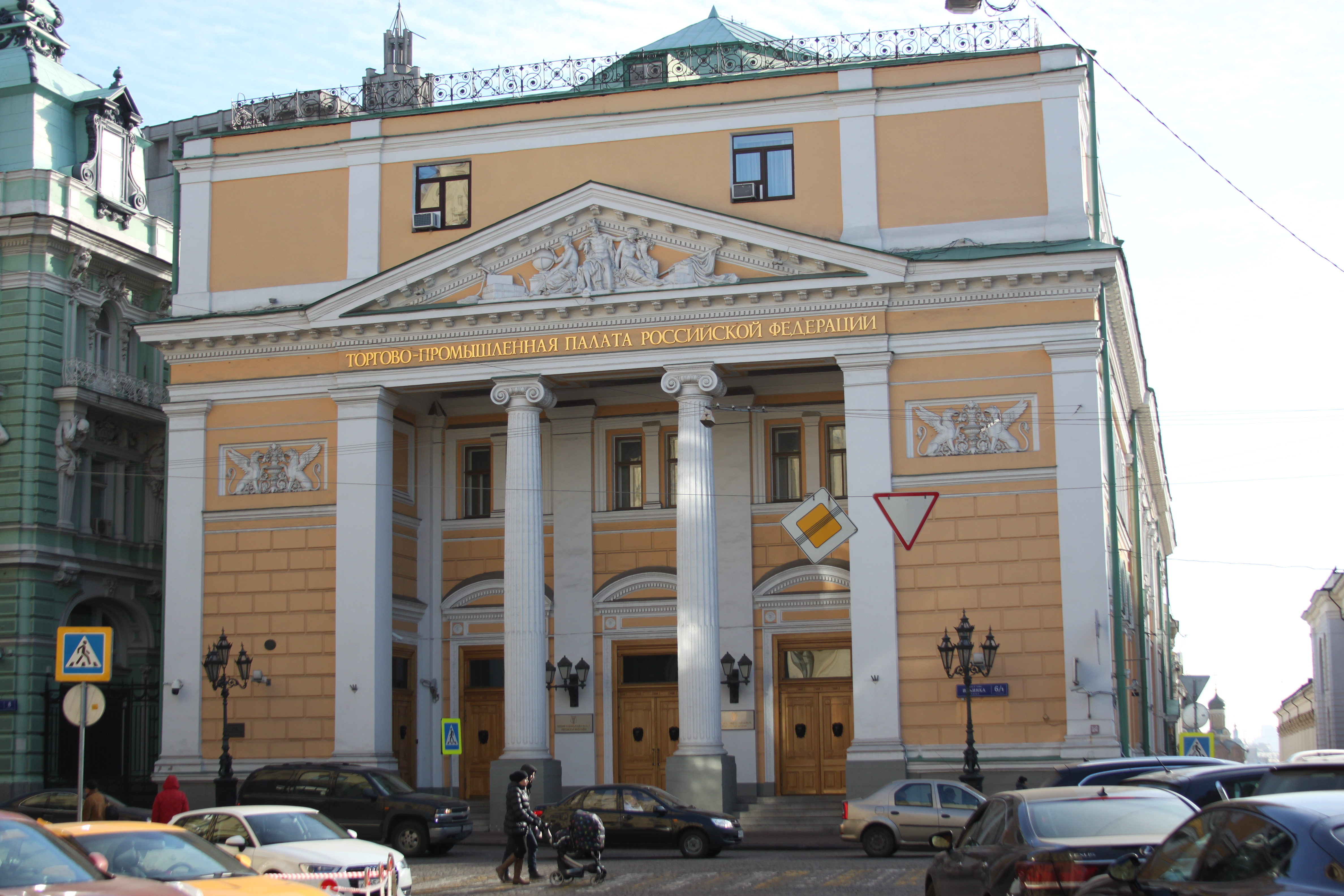 2014 Moscow Chamber of Commerce and Industry of the Russian Federation Торгово-промышленная палата Российской Федерации